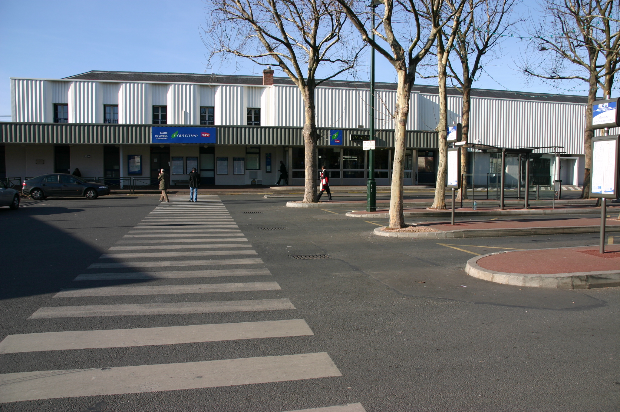 La gare de Corbeil-Essonnes, Corbeil-Essonnes, département de l'Essonne (France)